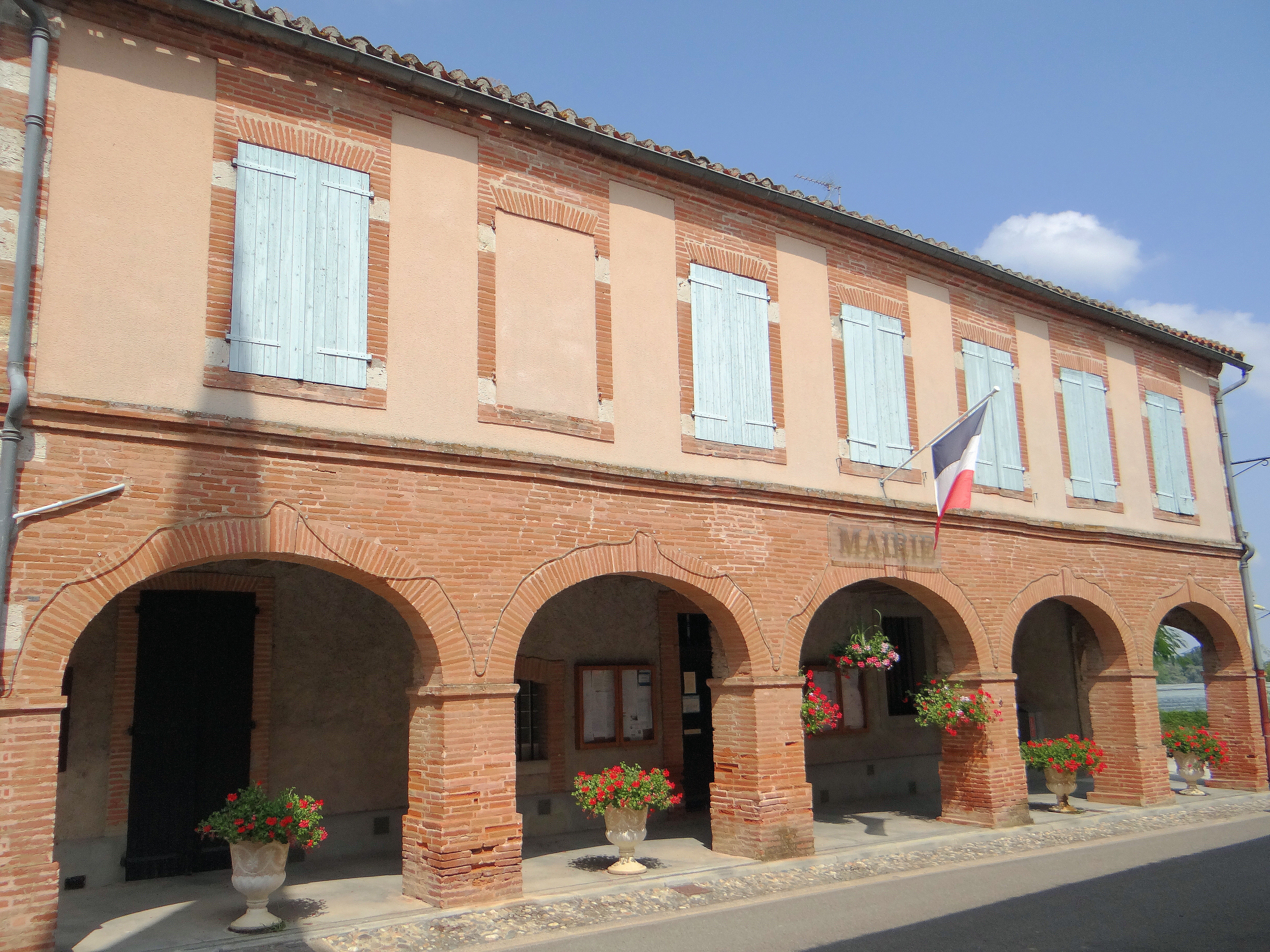 Saint-Aignan (Tarn-et-Garonne) - Mairie